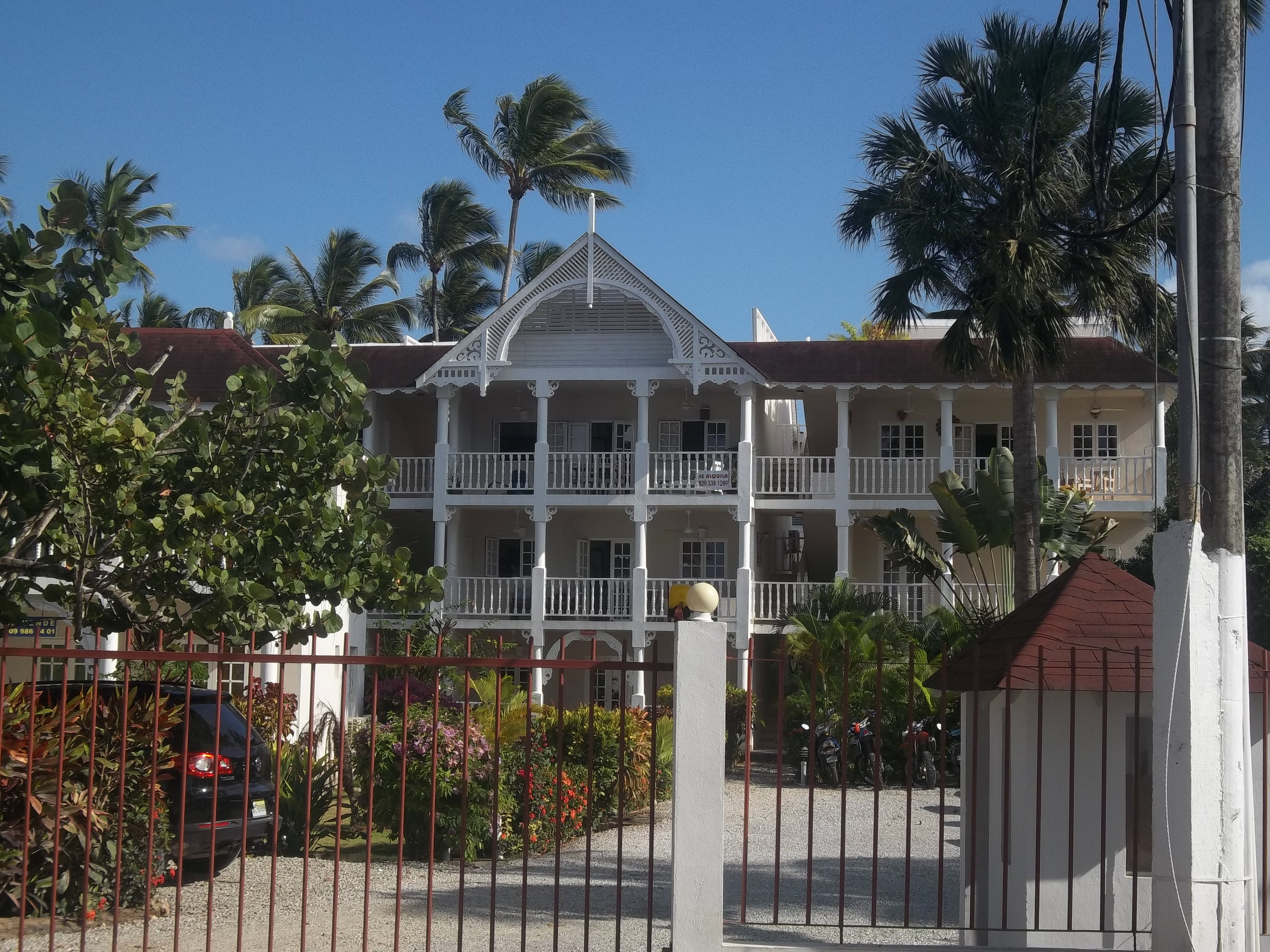 buen hotel